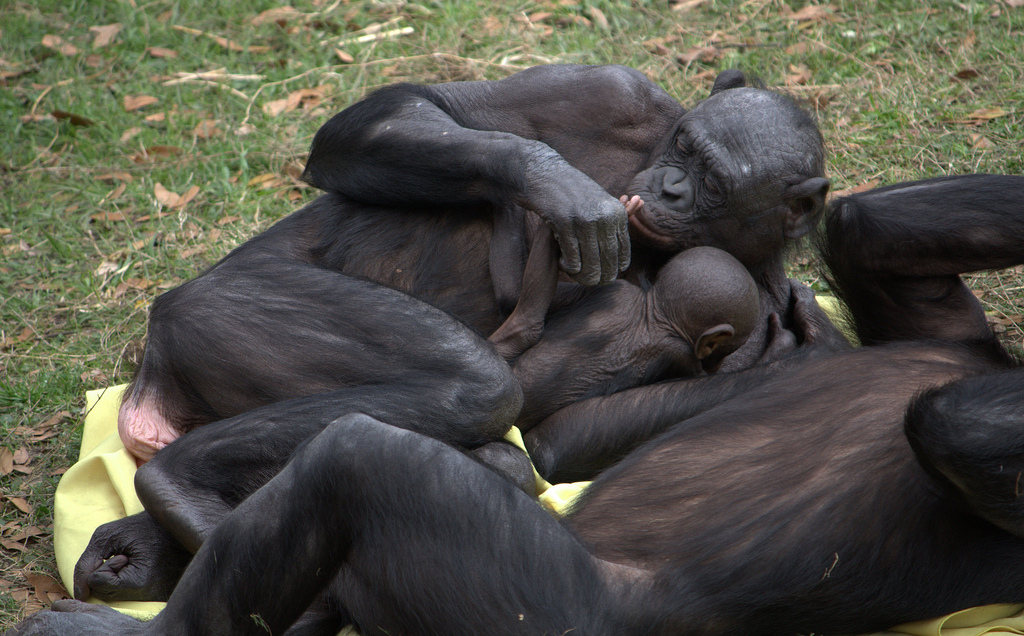 Bonobo kissing baby